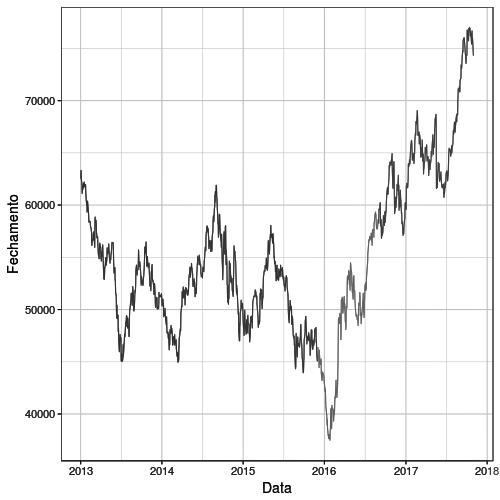 Ibovespa durante a crise econômica no Brasil